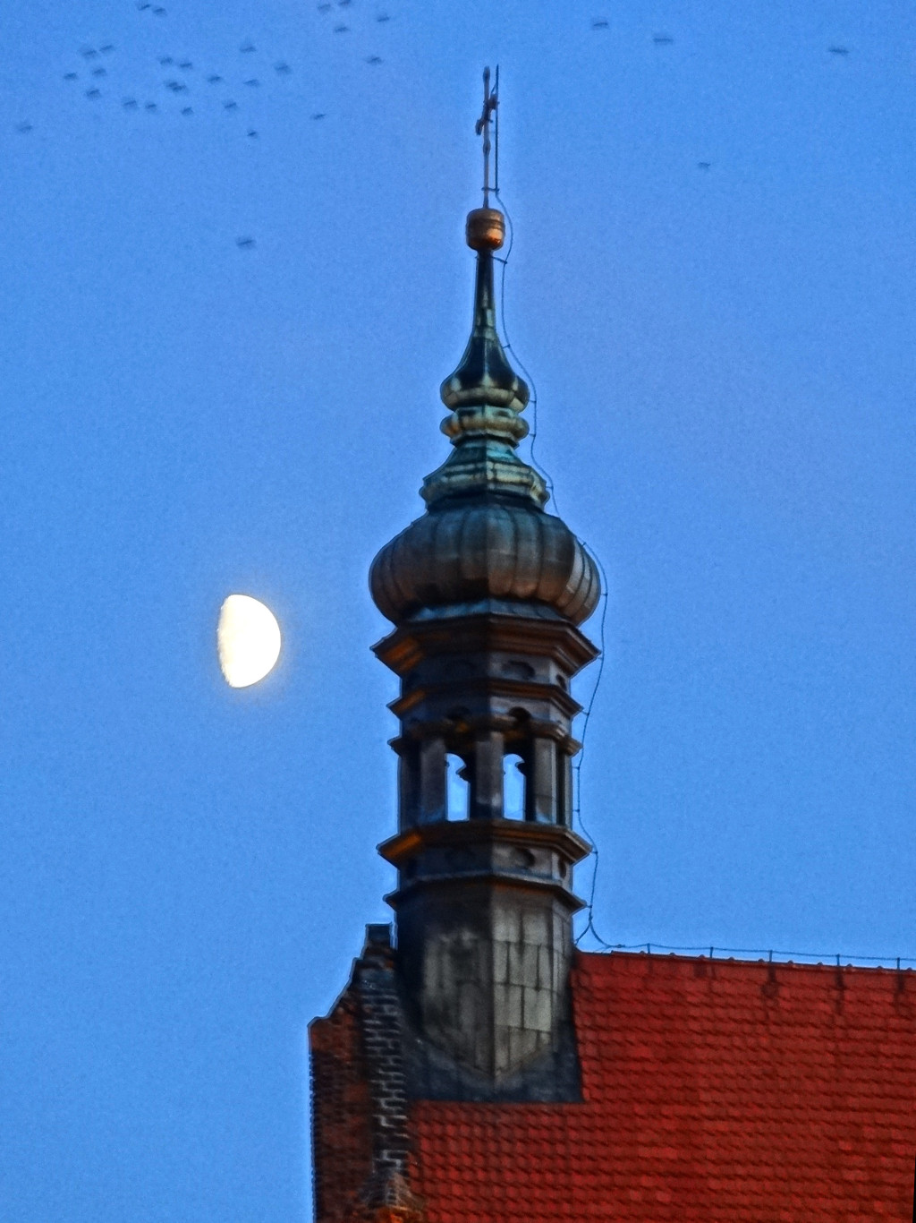 Katedra p.w. św. Marcina i Mikołaja w Bydgoszczy (XIV-XV wiek)